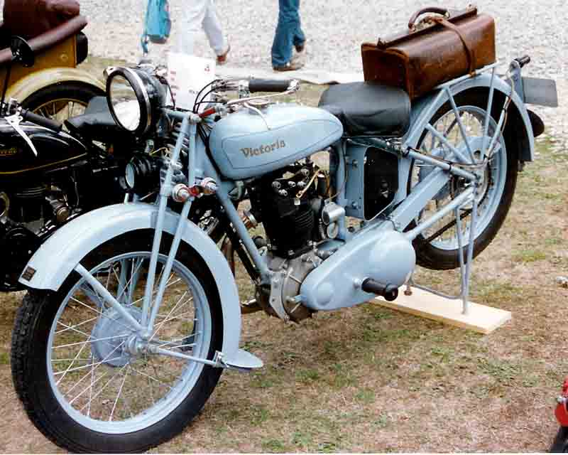 Victoria 1929